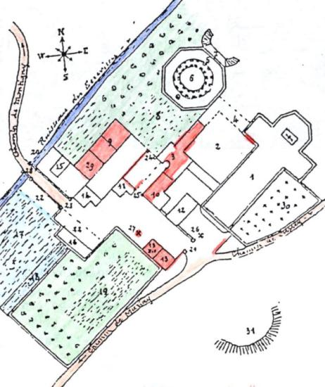 Auteur : Jean-René Sujet : Plan de l'abbaye de Cherlieu ; les zones en rouge représentent les vestiges actuels Plan de Cherlieu, au moment de la Révolution 1. Eglise ; 2. Cloître ancien ; 3. Maison conventuelle (1708) ; 4. Quartier des novices; 5. Nouveau palais monastique ; 6. Cloître moderne (17 mai 1773) ; 7. Façade du Levant et grand escalier ; 8. Jardin et verger ; 9. Maisons de domestiques ; 10. Remises ; 12. Quartier de l'abbé ; 11 et 13. Maison des portiers ; 13 bis. Prison ; 14 et 16. Dépendances ; 15. Colombier ; 17. Etang, actuellement desséché ; 18. Carpière ; 19 Jardin de l'abbé ; 20. Ruisseau des Ecrevisses ; 21, 23, 24, 25. Portes ; 22 Ancienne digue ; 20. Emplacement ancien de la Croix ; 27. Emplacement actuel de la Croix monolithe de Ferdinand de Rye (1613) ; 28. Pont et vannage ; 20. Maison du notaire royal et abbatial ; 30. Cimetière des moines ; 31. La grande Carrière.